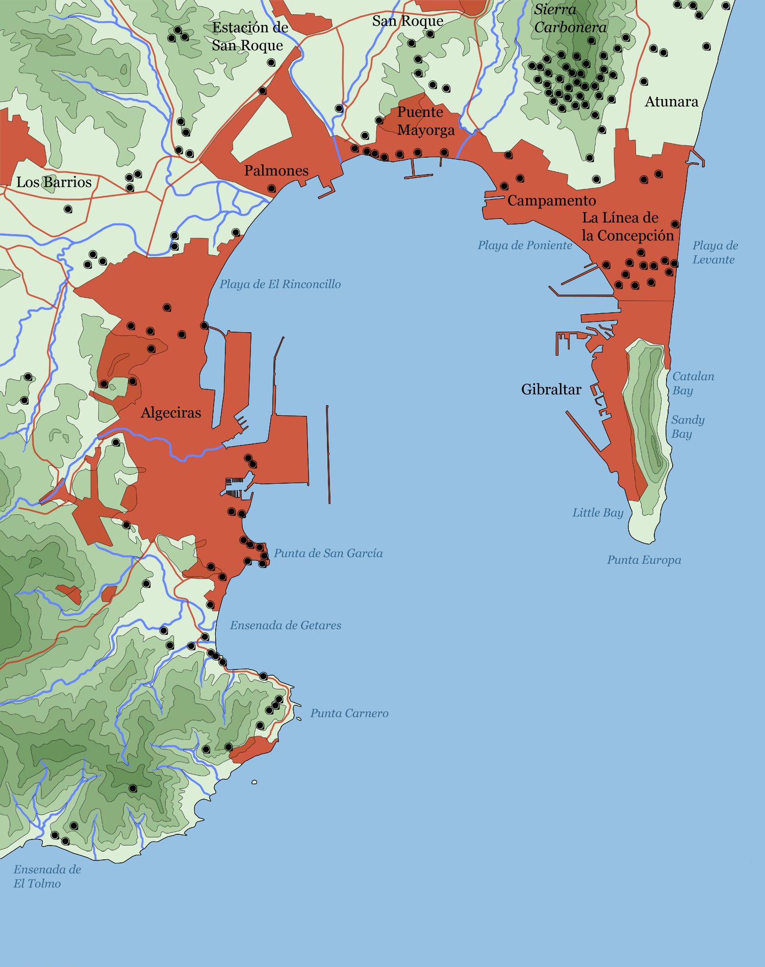 Mapa de los búnkers construidos a partir de 1939 en la Bahía de Algeciras.